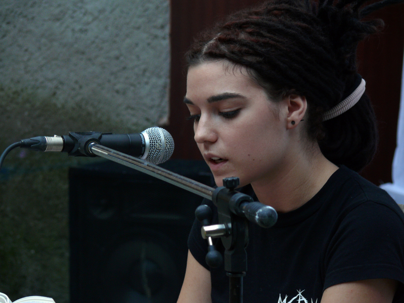 Cornelia Travnicek